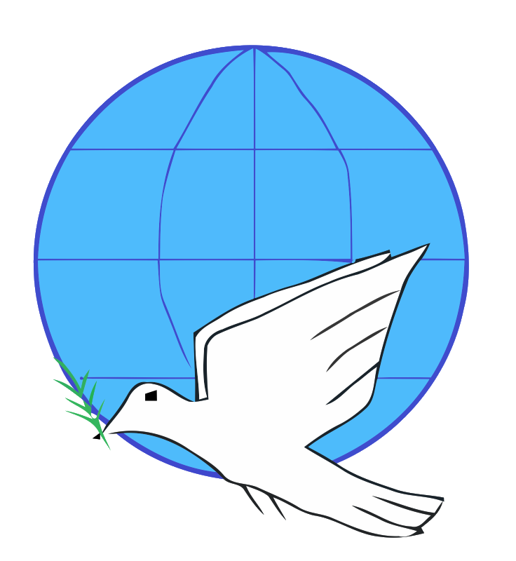 Logotipo del "Movimiento de Países No Alineados".